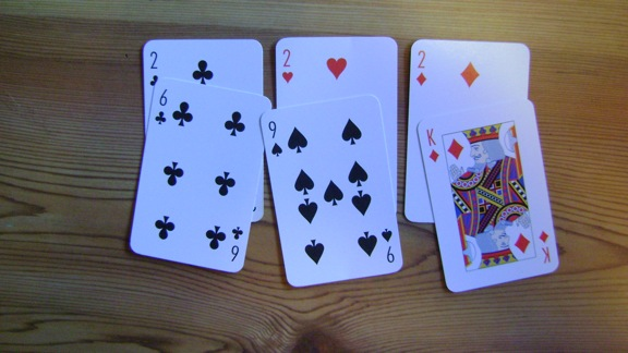 billede til kortartikel, stikker